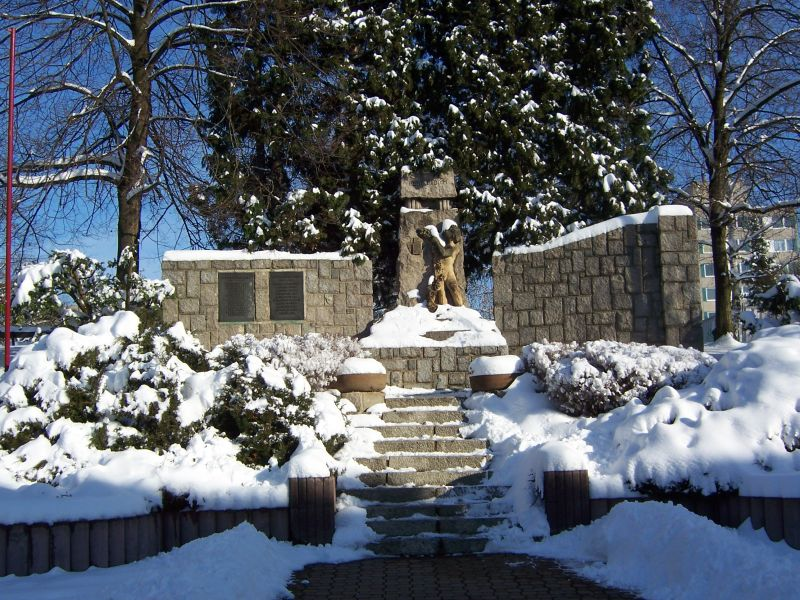 Praha-Petrovice, památník padlým / Prague-Petrovice, war memorial